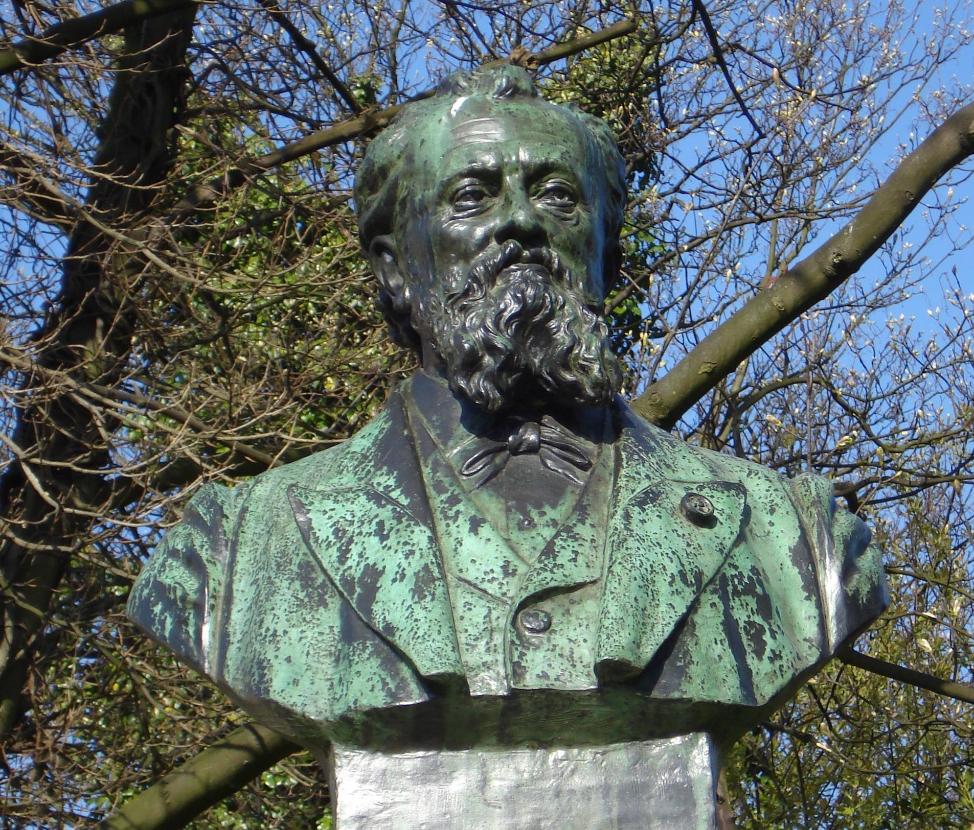 Den Haag, Groot Hertoginnelaan. Monument "Richard Hol" van Bart van Hove & GM van de Made. The Hague/The Netherlands.